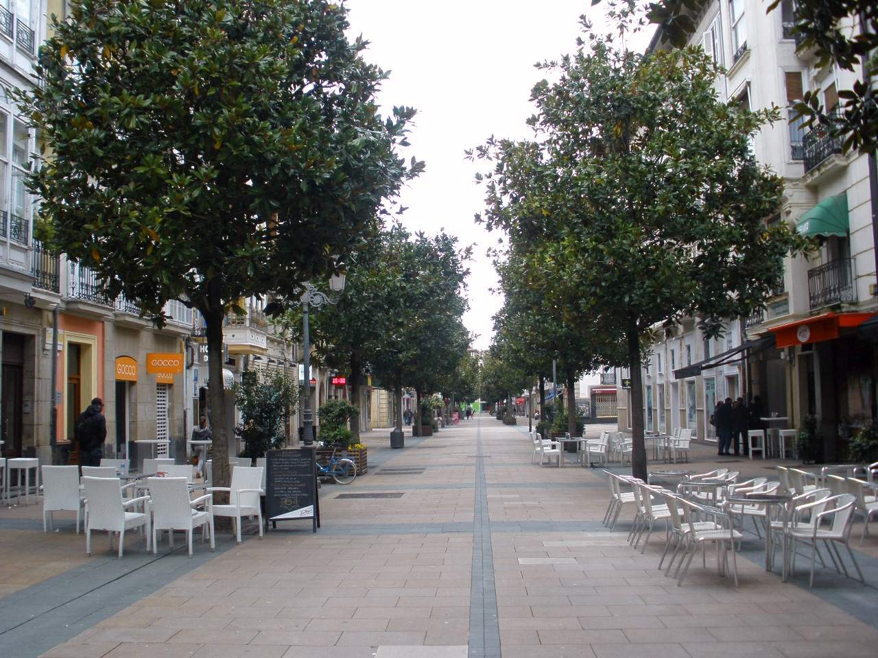 Vitoria - Calle Dato